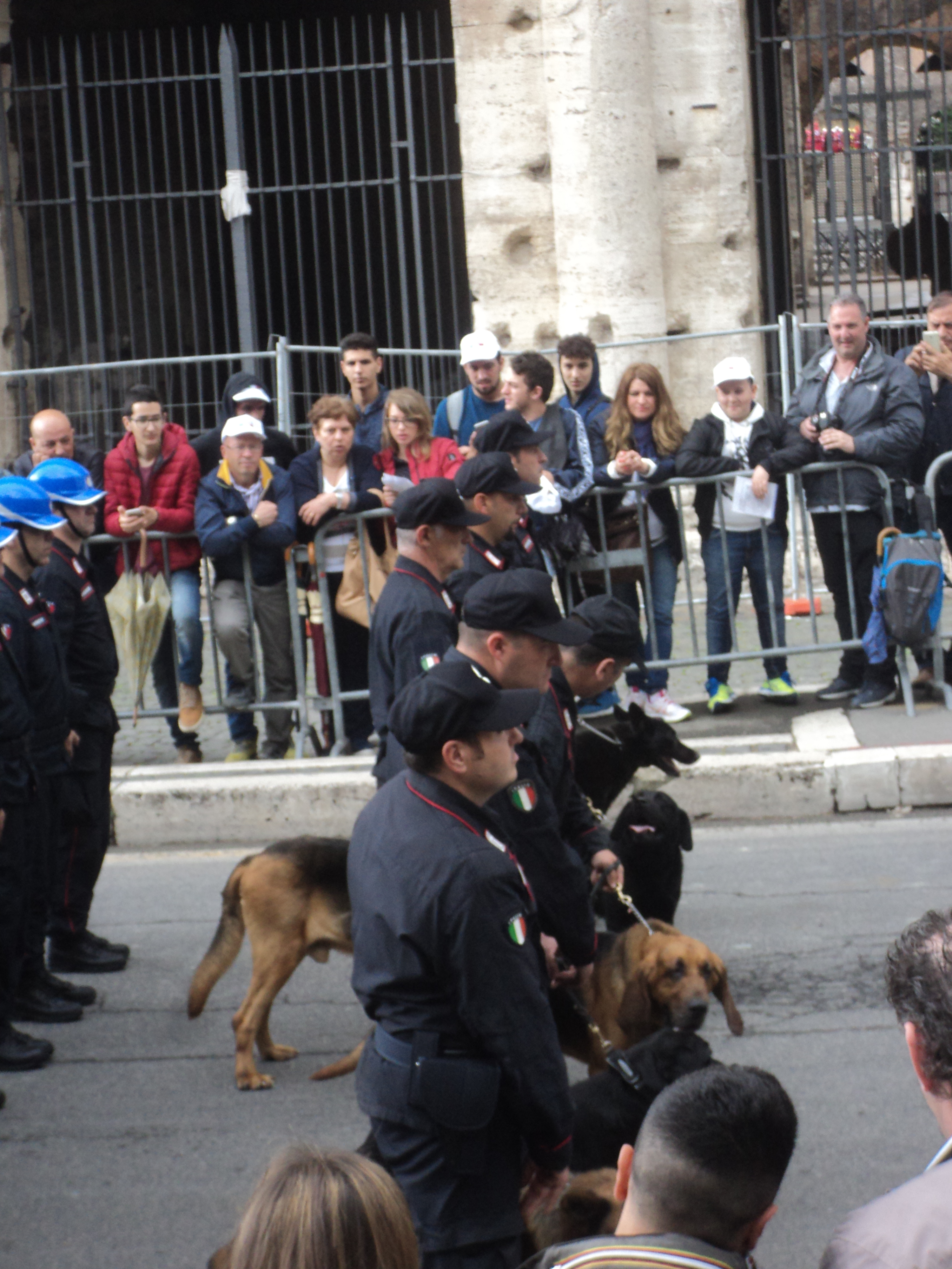 Festa della Repubblica 2016